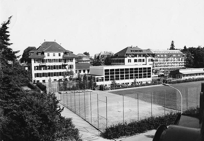 Evangelisches Seminar Muristalden (Bern, Schweiz), Ansicht von Südwesten; Gebäude v.l.n.r.: Seminargebäude, Pavillons, dahinter Konvikt und Seminarschule.